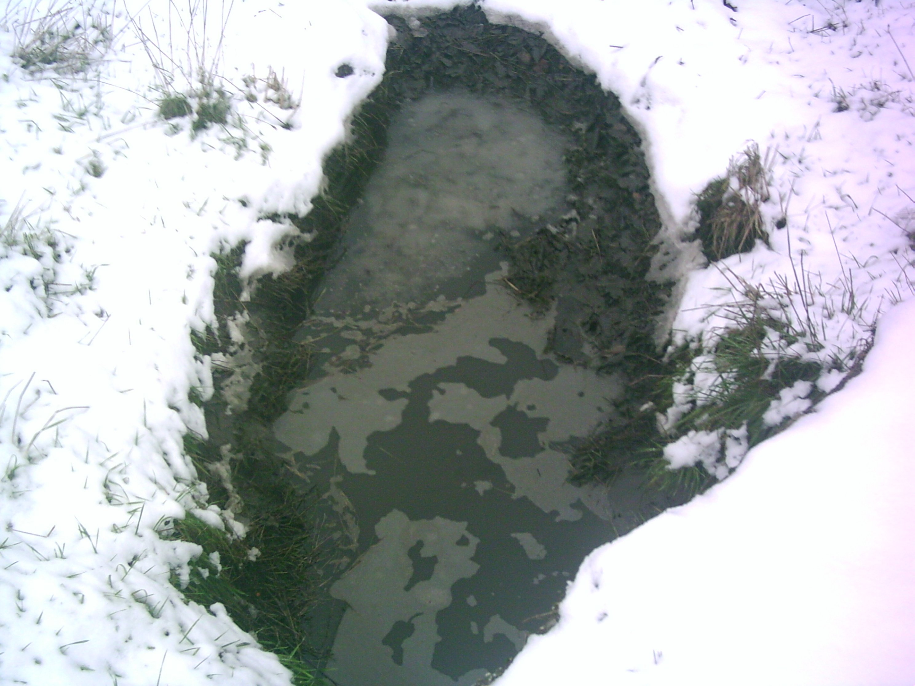 eigenes foto, public domain